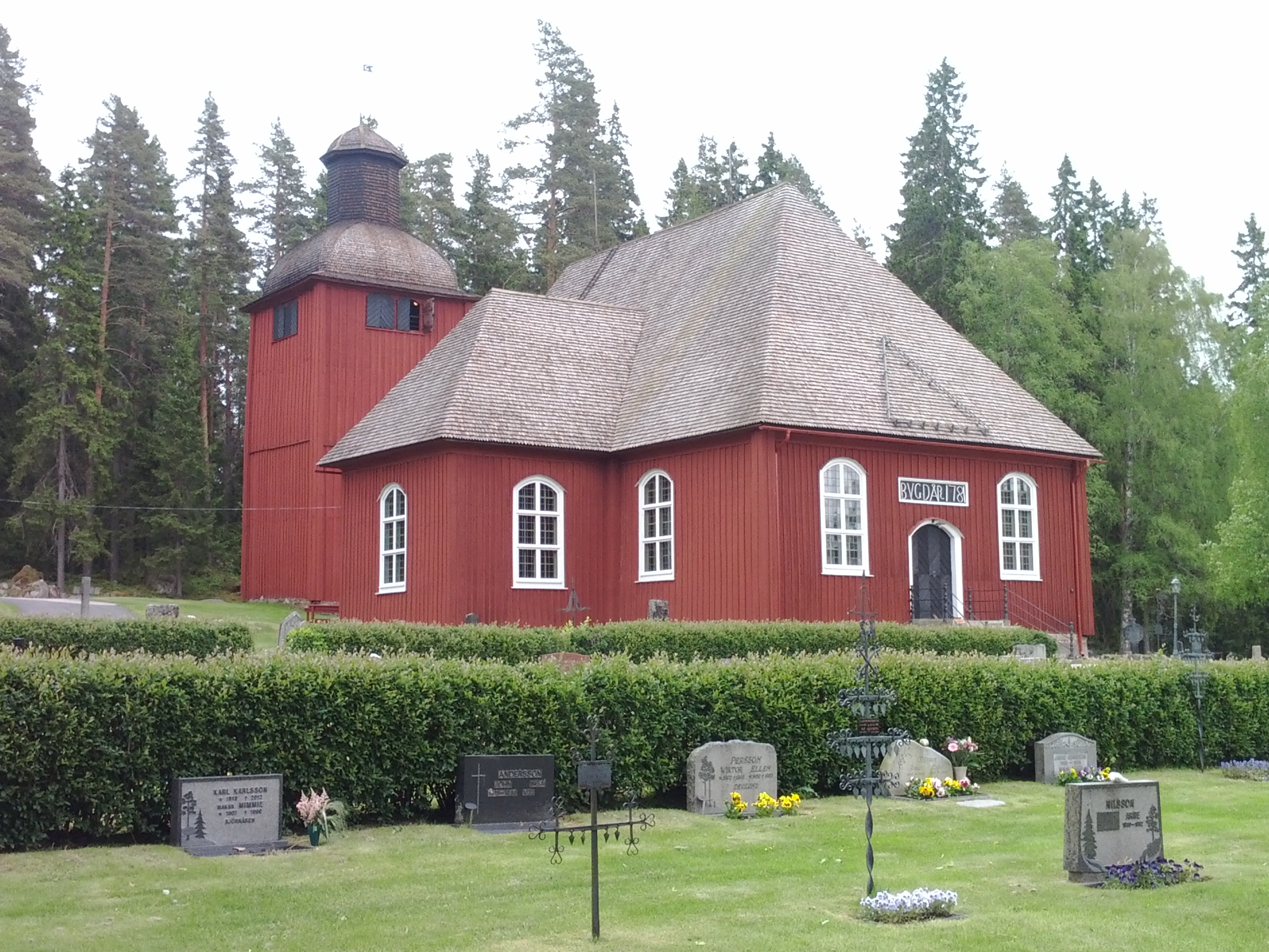 Gustav Adolfs kyrka (Gustavaskogen 2:2) This photo was uploaded with Wiki Loves Monuments mobile 1.2.1 (Android).